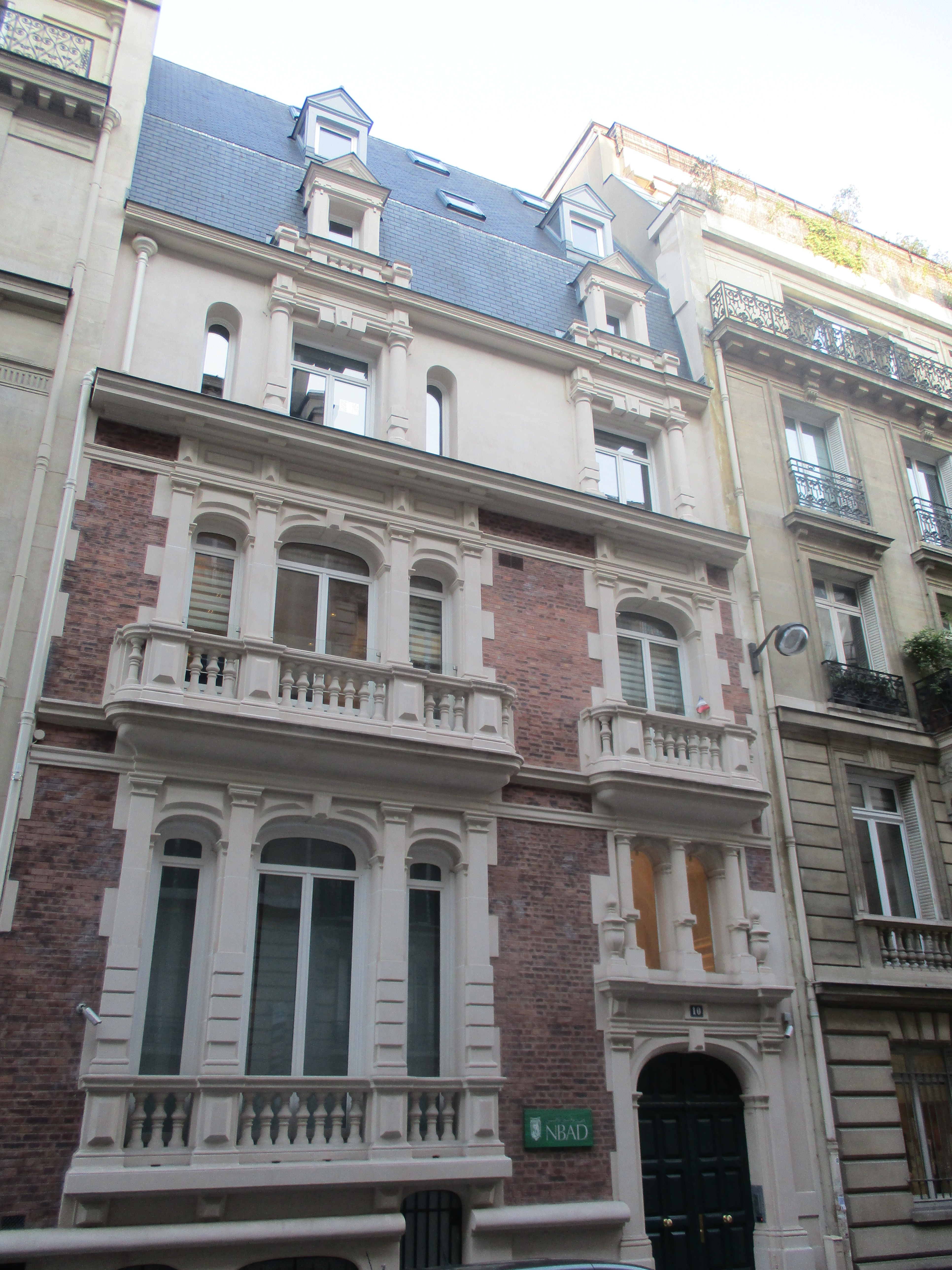 10 rue Magellan (Paris VIIIe): ancien hôtel particulier du comte de Gramont.